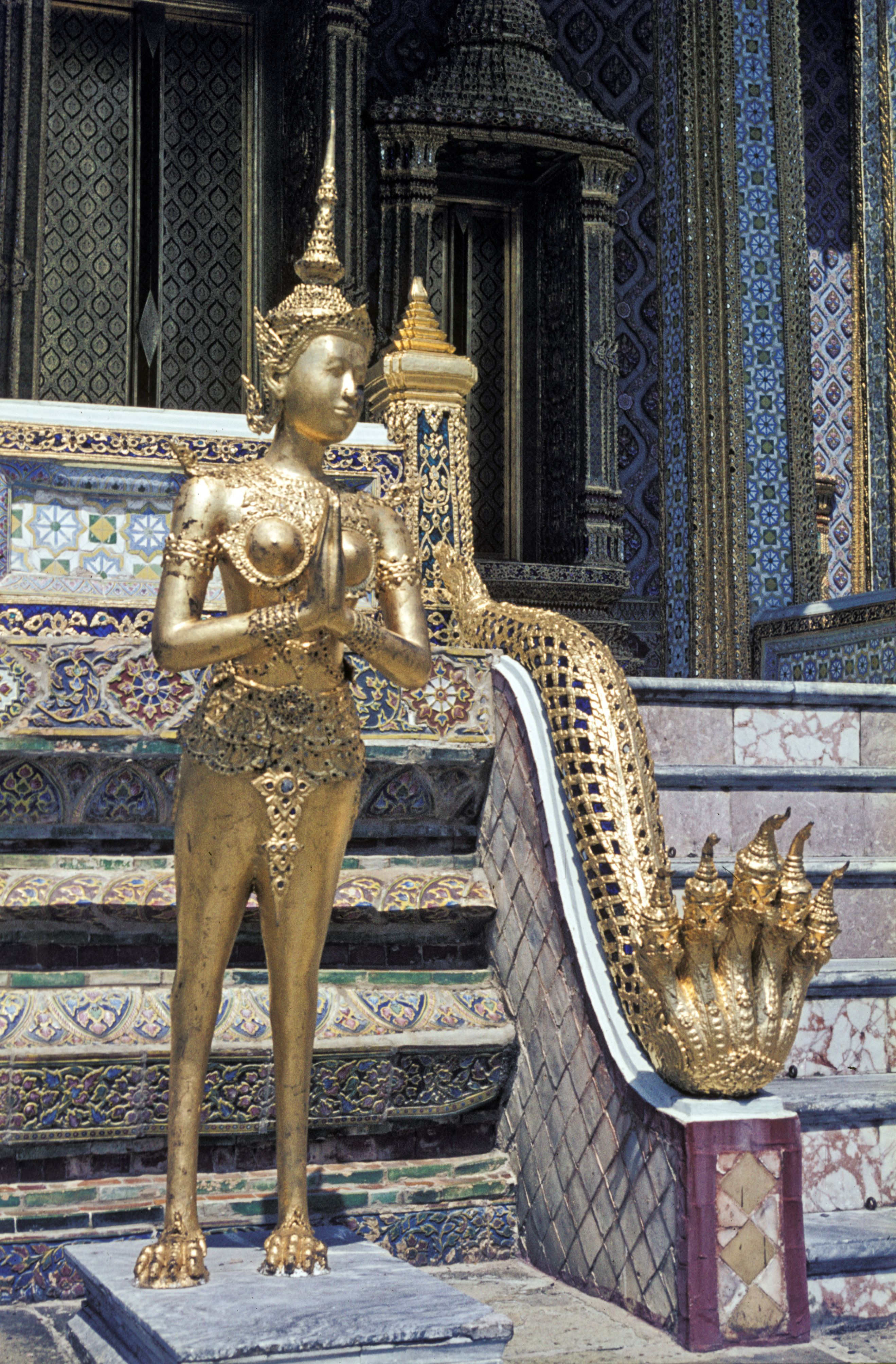 Bangkok, Thailand